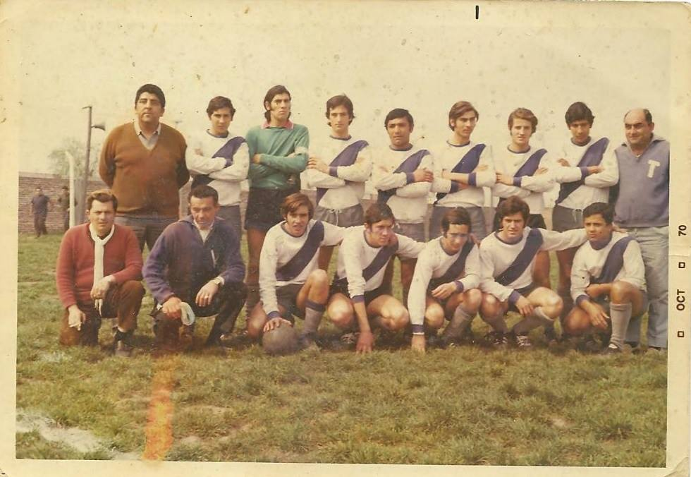 Escuadra de Deportivo Merlo del año 1970